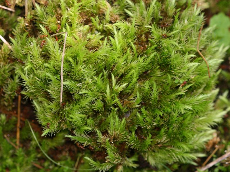 Sumpf-Streifensternmoos (Aulacomnium palustre)